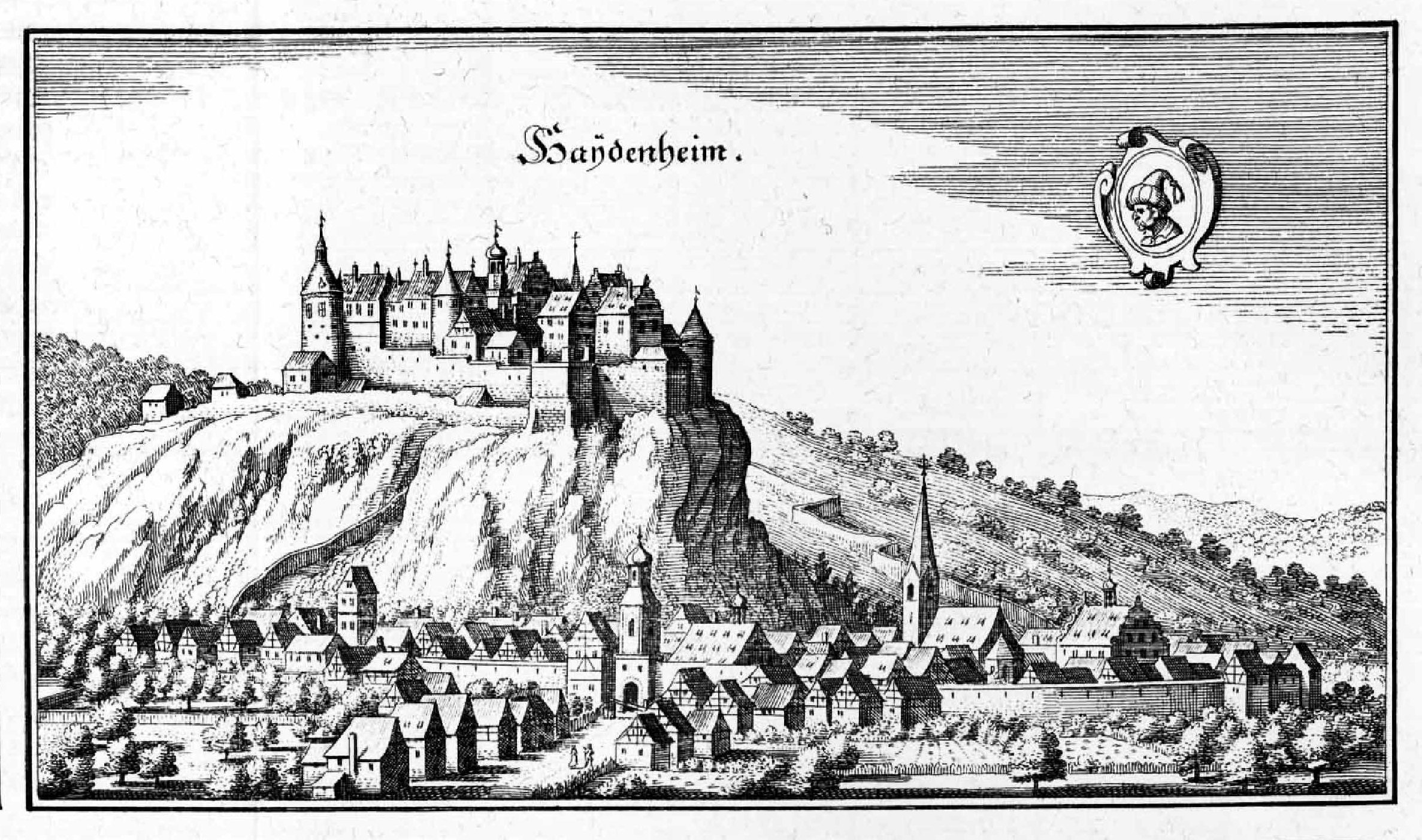 View of Heidenheim an der Brenz ~1650, from De Merian Sueviae